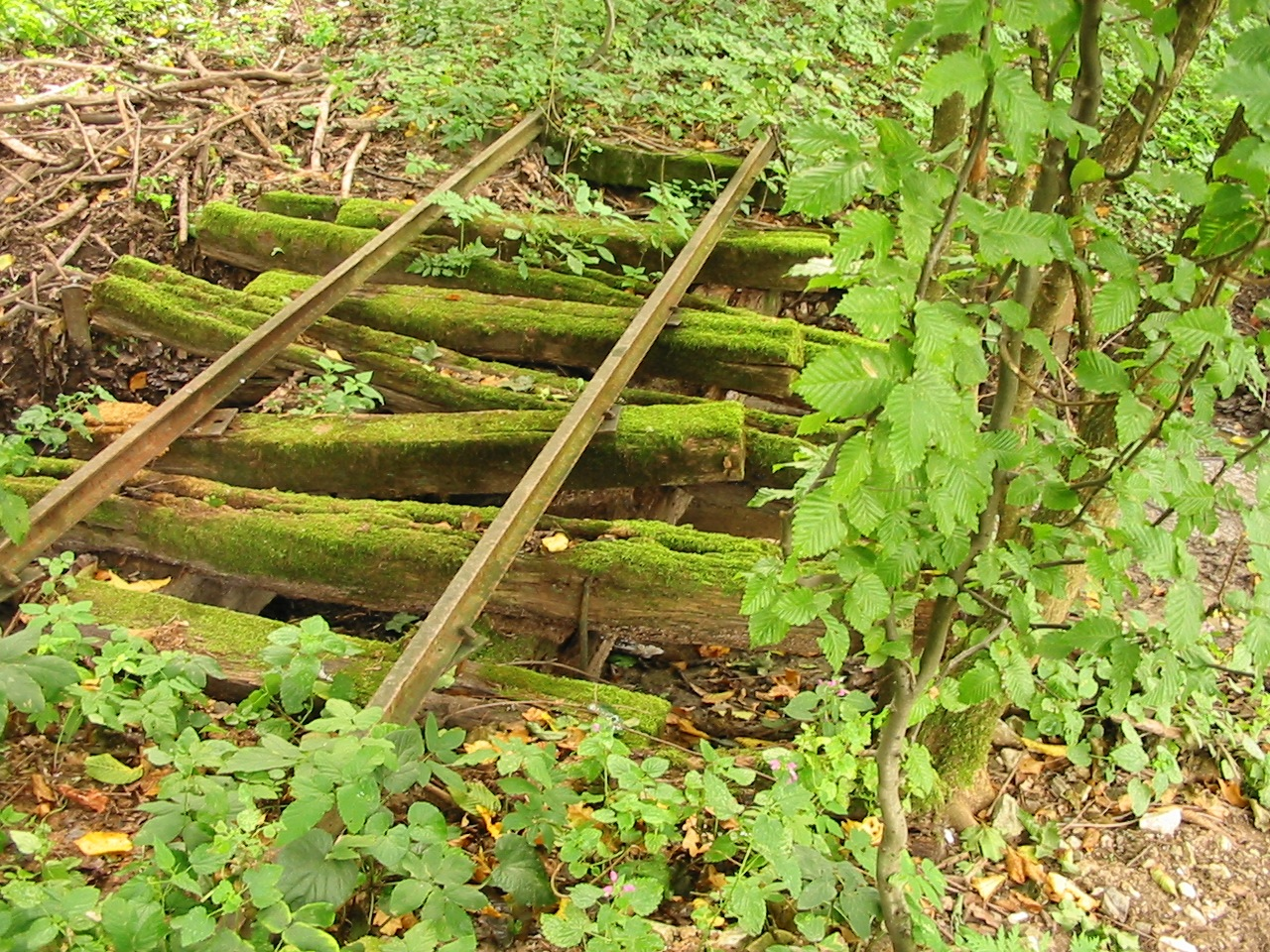 Híd a Hidegkúti-völgyben, a Felsőtárkányi Állami Erdei Vasút első vonalszakaszán (Felsőtárkány)